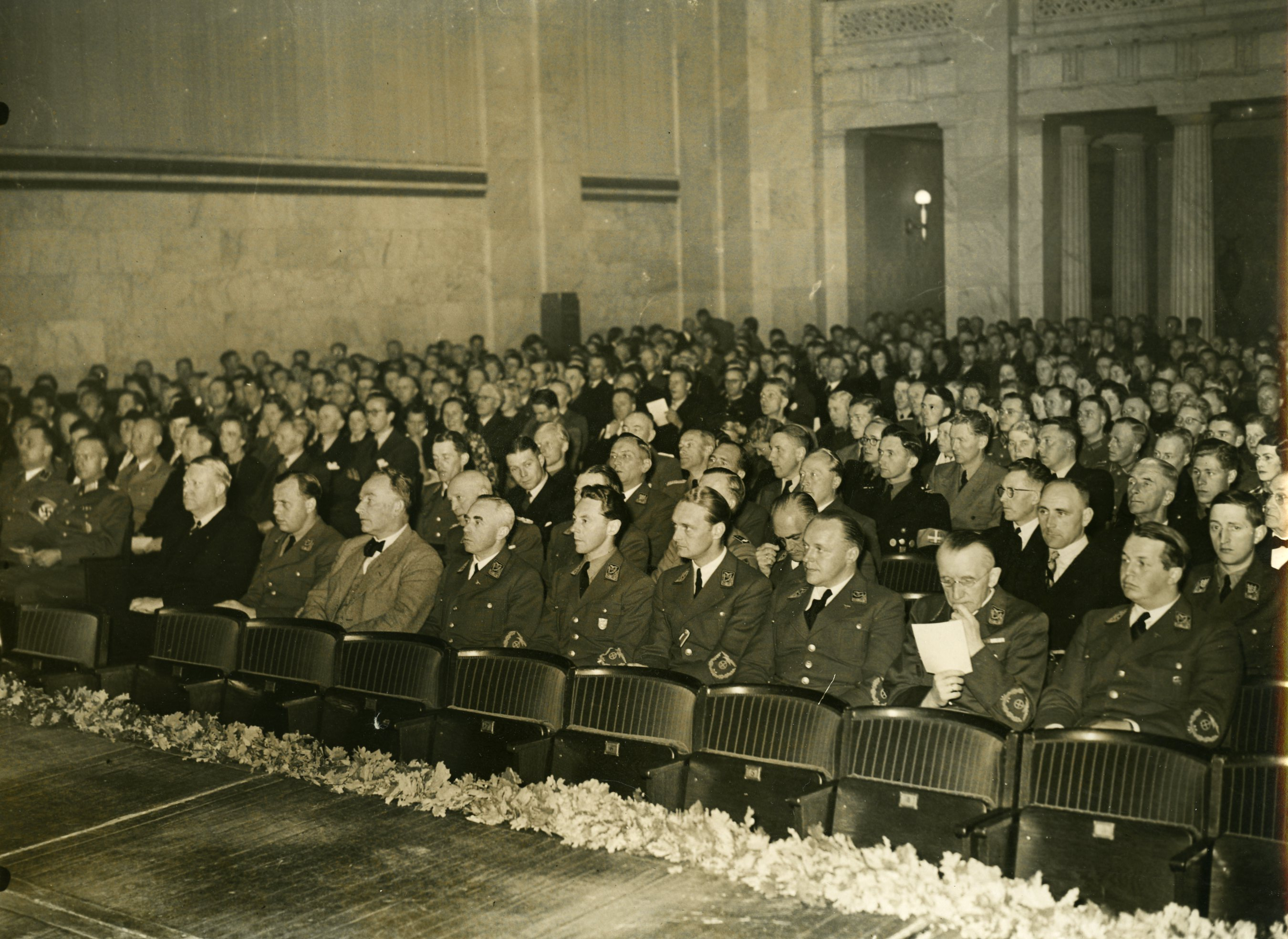 1942/09. RA/RAFA-3309/U 41B/7 /41-7-3 img340